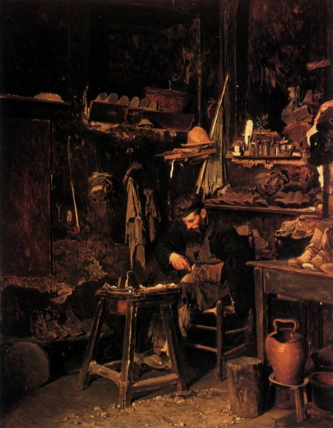 Teofilo Patini - Interno con culla olio su tela - 1872-73 62 x 49.5 cm Banca Popolare Adriatico, Pesaro